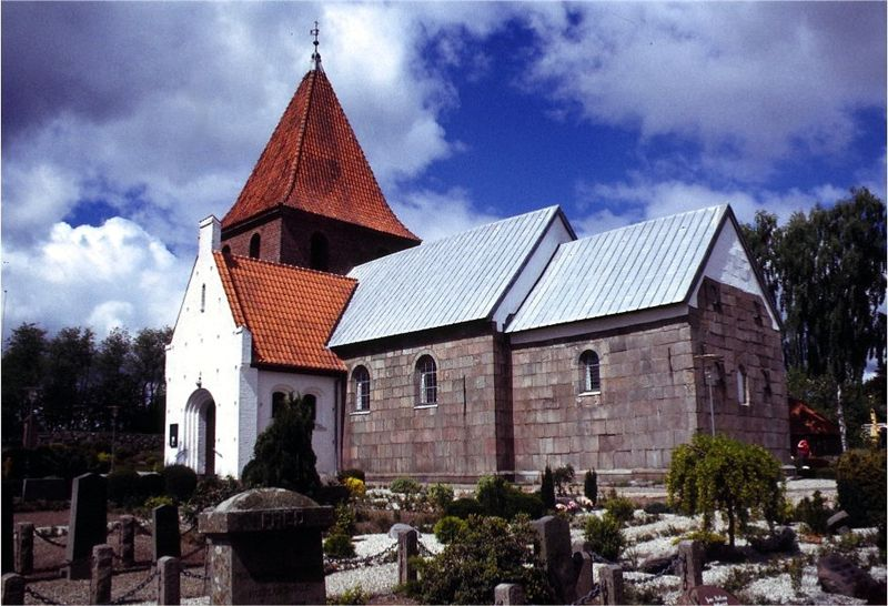 Hallund Kirke i Danmark. Hallund kirke